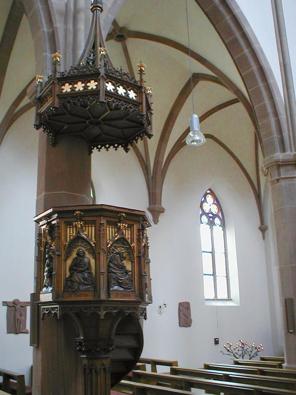 Kanzel der kath. Pfarrkirche Unserer lieben Frau in Waibstadt